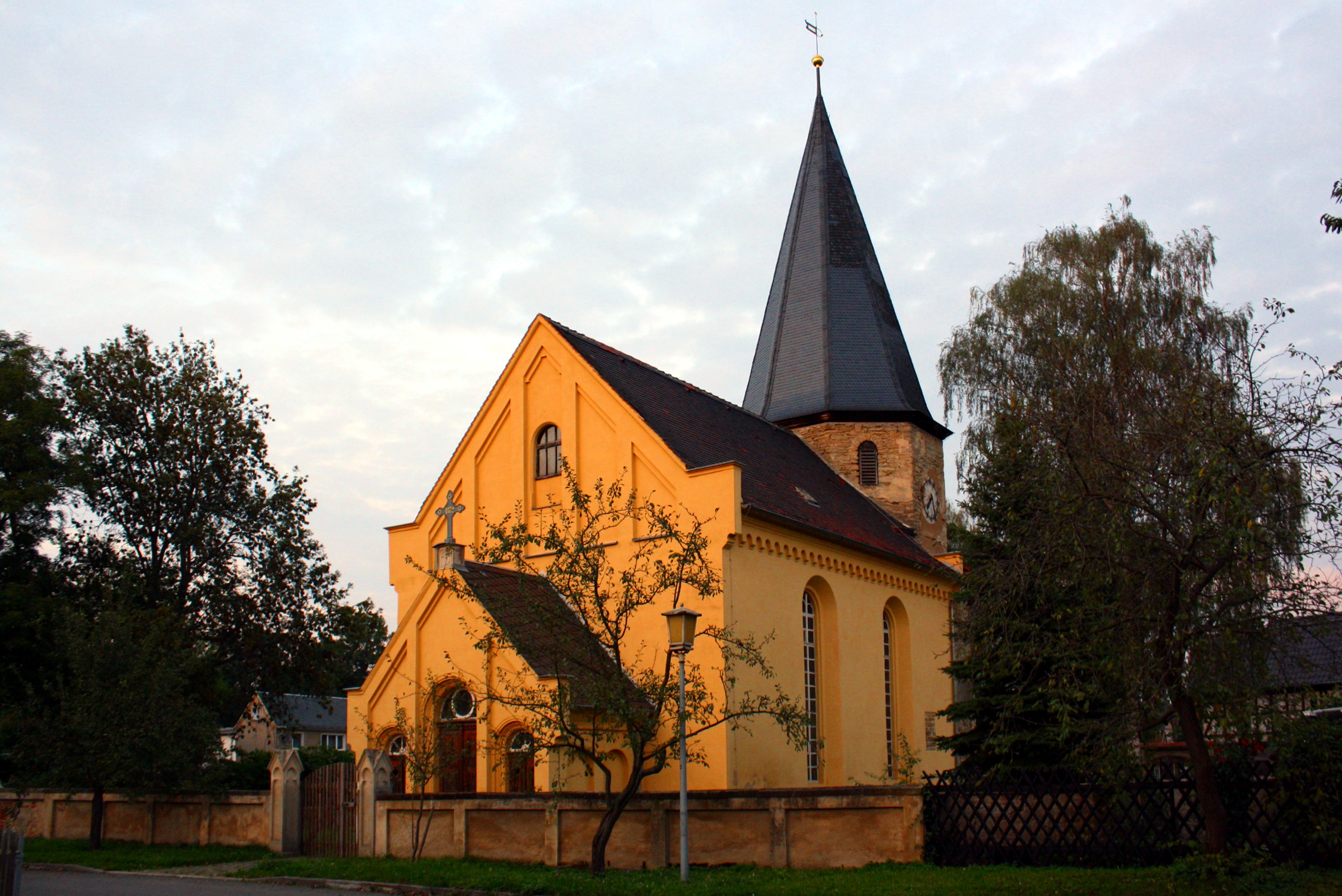 Kirche im ostthüringischen Hirschfeld bei Gera